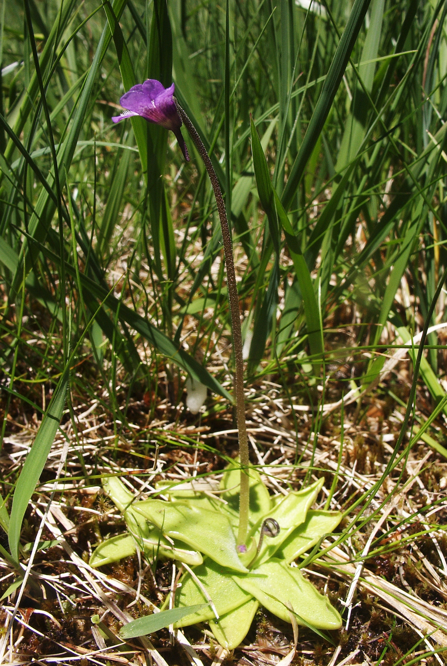 Pinguicula vulgaris, Hegaualb, Germany